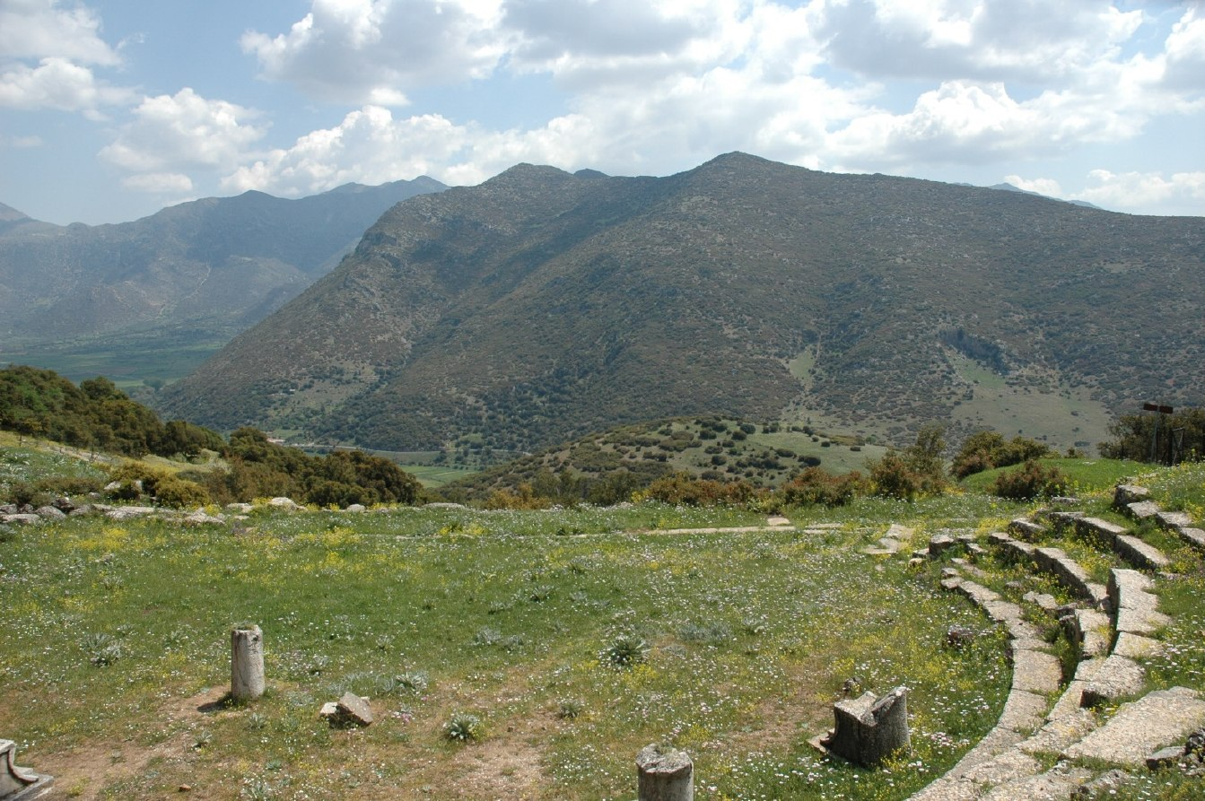 Das antike Theater von Orchomenos (Arkadien)